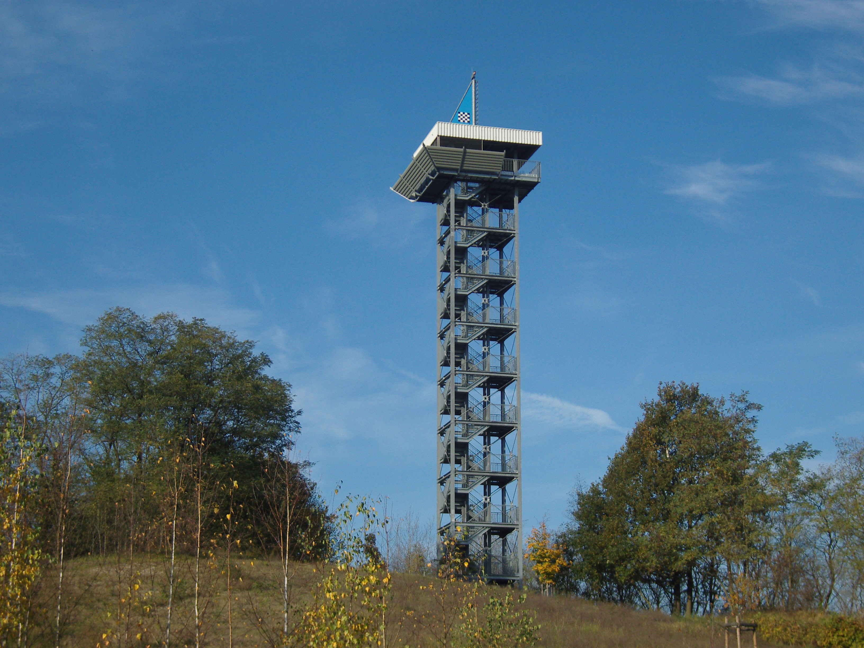 Aussichtsturm in Hörlitz im Amt Schipkau im Landkreis Oberspreewald-Lausitz